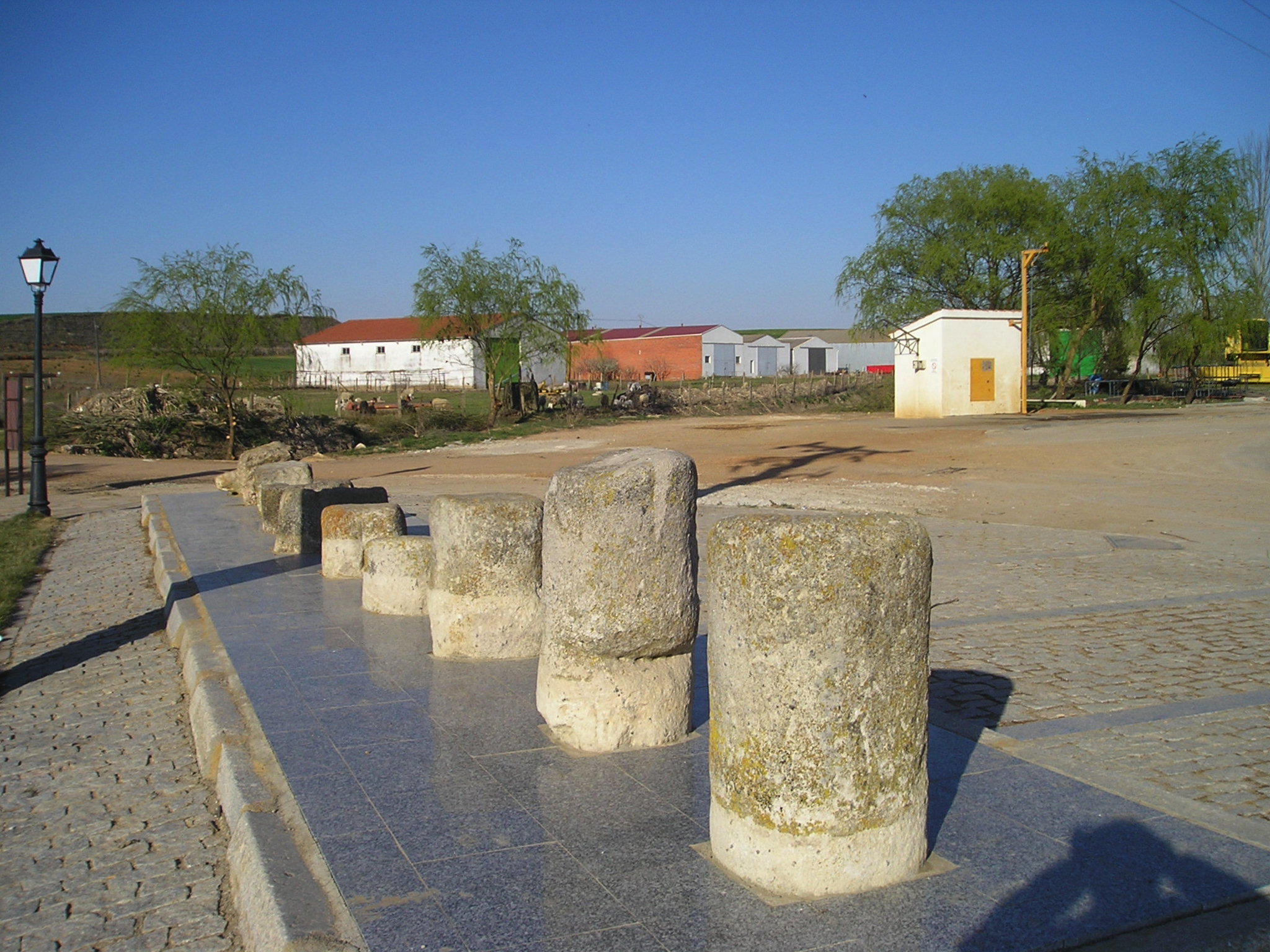 Miliario seccionado junto al arroyo Valdunciel, en Calzada de Valdunciel (Salamanca, España), al Norte de Salamanca, en el recorrido de la Vía de la Plata